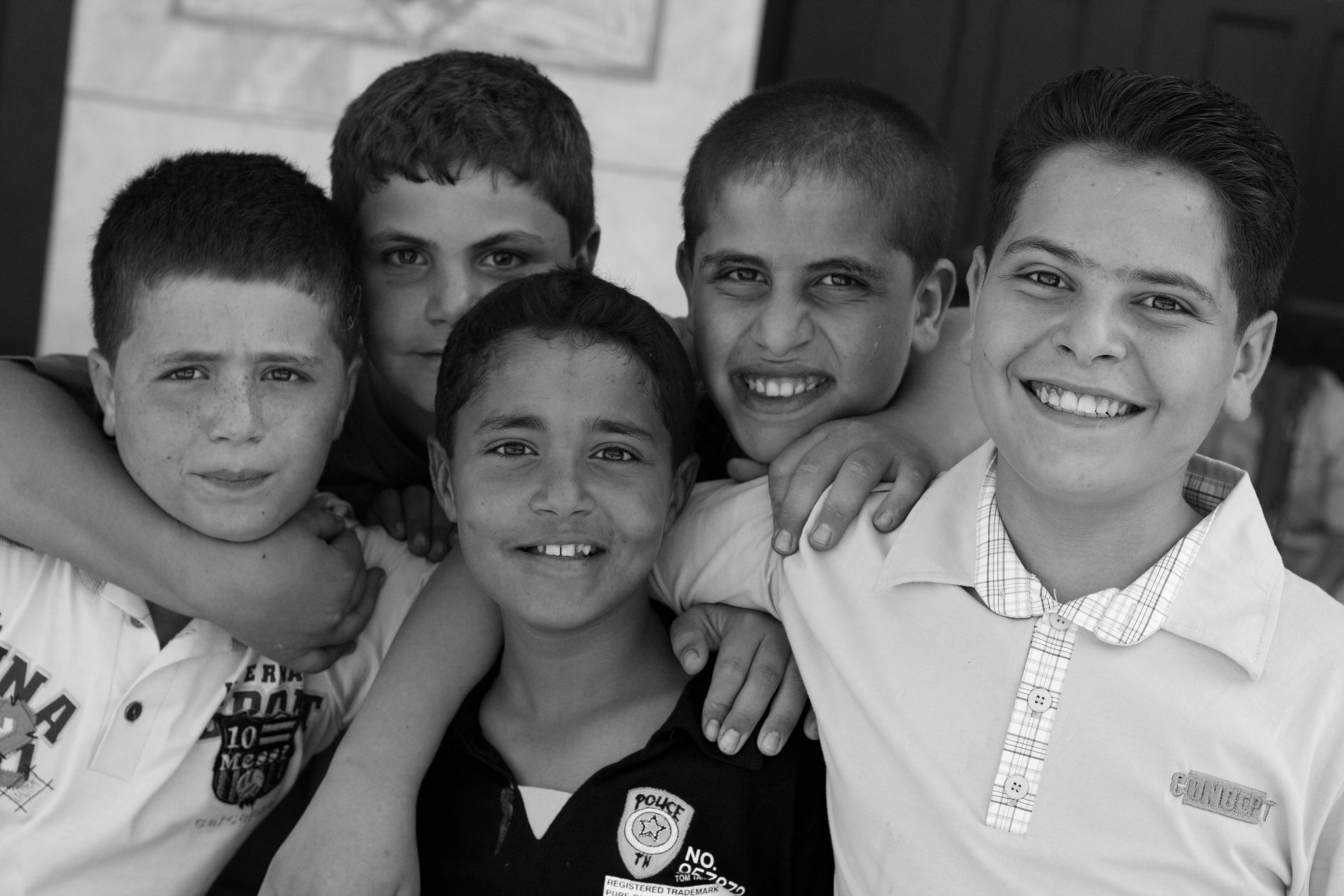 Umayyad Mosque, Damascus